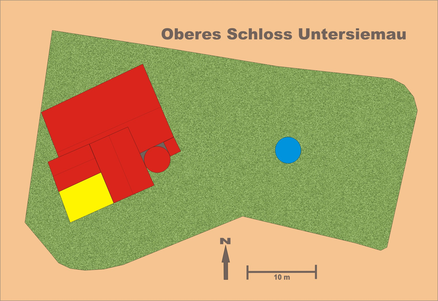 Lageplan Oberes Schloss in Untersiemau, Kreis Coburg, Bayern